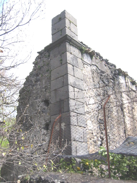 Particolare costruttivo, elemento d'angolo della Chiesa della Misericordia di Malpasso Autore e fonte Lupudilaguardia 16:35, 21 mar 2007 (CET)